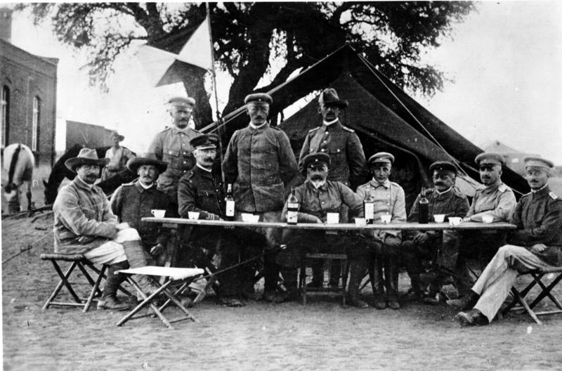 Deutsch-Südwestafrika, Herero-Aufstand Zentralbild Generalleutnant Lothar von Trotha (GND 117636908), der Oberkommandierende der Schutztruppe in Deutsch-Südwestafrika, mit seinem Stabe in Keetmanshoop während des Herero-Aufstandes 1904. 8932-05 Abgebildete Personen: stehend von links: Oberleutnant von Trotha (Kommandant Hauptquartier) - Stabsveterinär Rakette - Oberleutnant Gundel (2.Tel.-Abt.) sitzend von links: Hauptmann v. Lettow-Vorbeck (1.Adjutant) - Hauptmann Bayer (Generalstab) - Colonel Trench (britischer Militärattaché) - Generalleutnant von Trotha - Leutnant von Goßler (Ordonnanz-Offizier) - Intendant Nachtigall - Major von Redern (Chef des Stabes) - Hauptmann von Bosse (2.Adjutant)